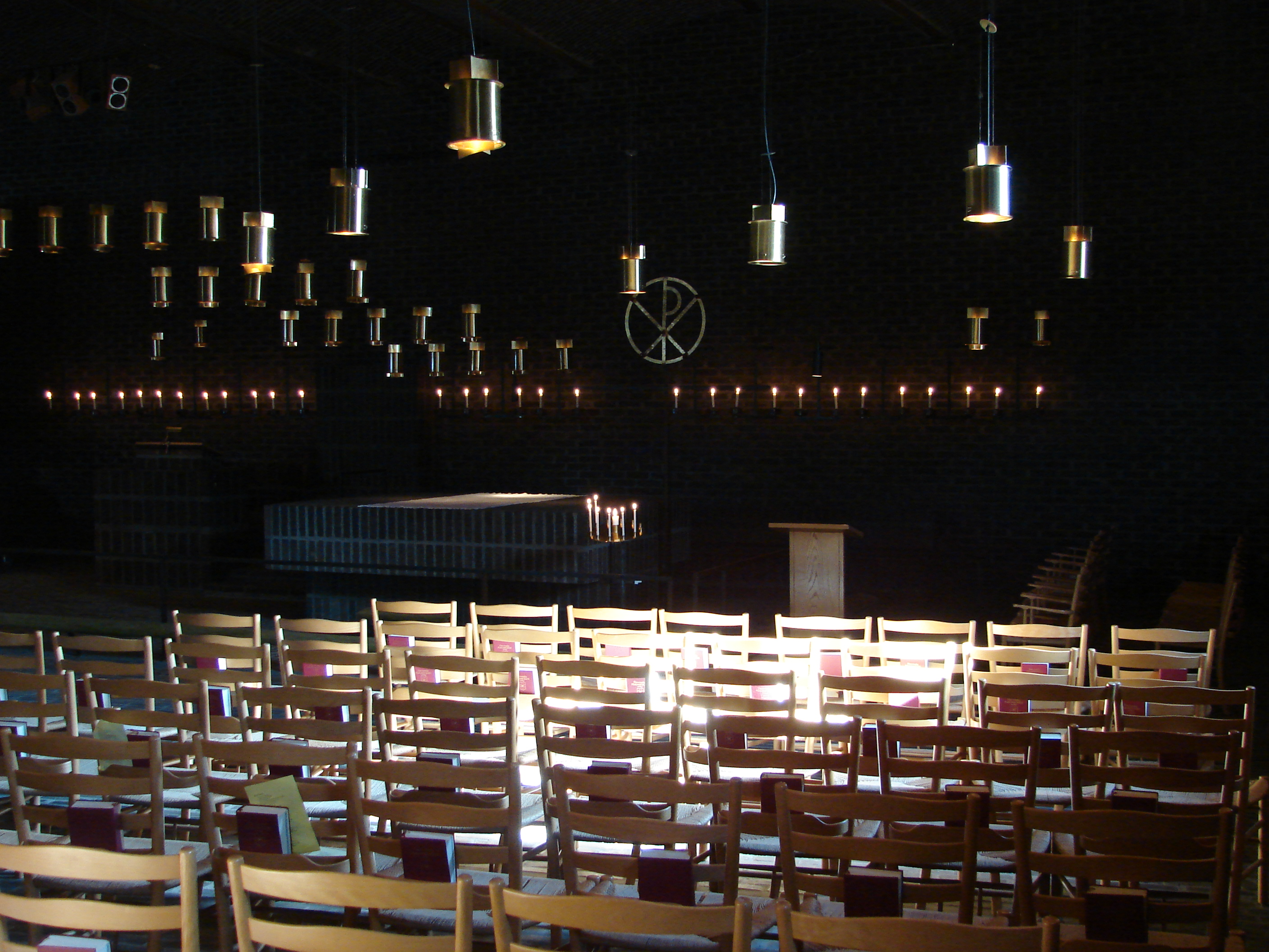 Sankt Petri Kyrka, Klippan, Skåne, Sverige